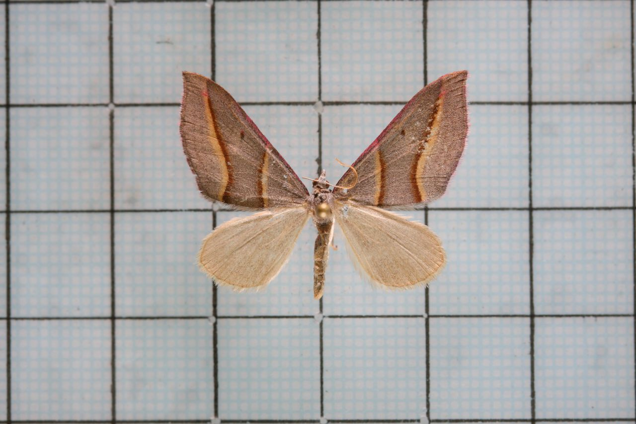 Docirava flavilinata Wileman,1915 咖啡帶波尺蛾 王效岳:台灣尺蛾科圖鑑 1 ,p.212